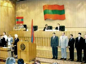 Parlamento de Transnistria